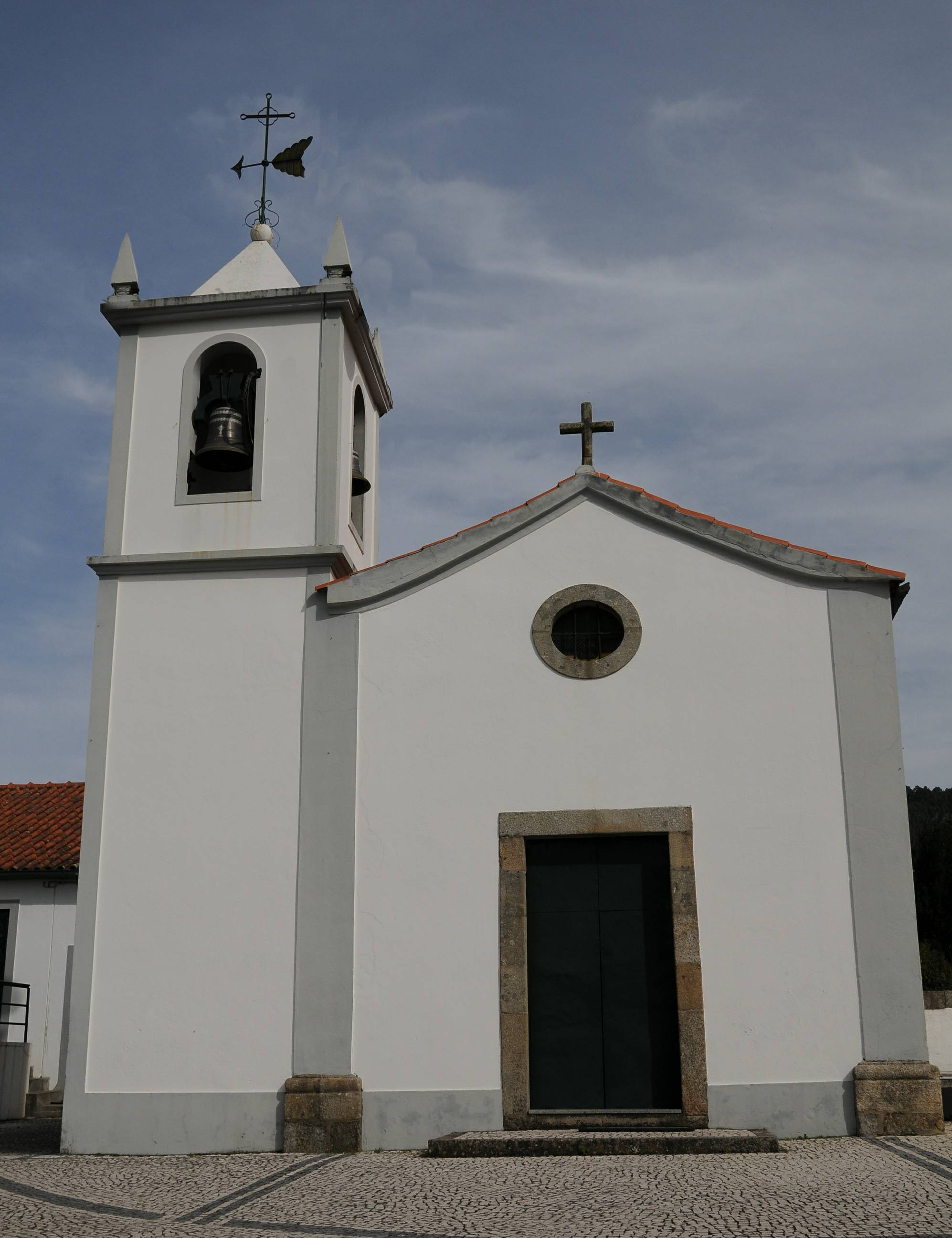 Fraiao Church, in Braga, Portugal